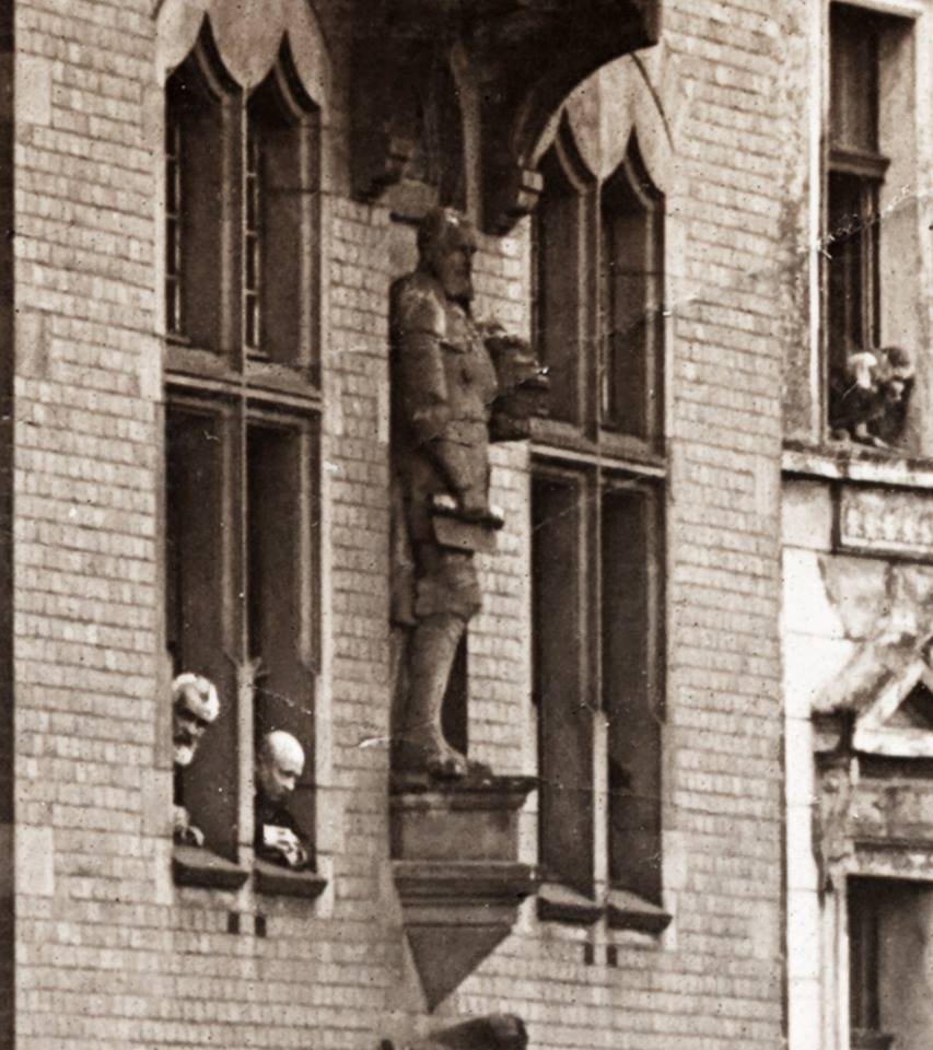 Figura margrabiego Jerzego Hohenzollerna-Ansbacha umieszczona w niszy elewacji frontowej tarnogórskiego ratusz (obecnie figura nie istnieje). 1913